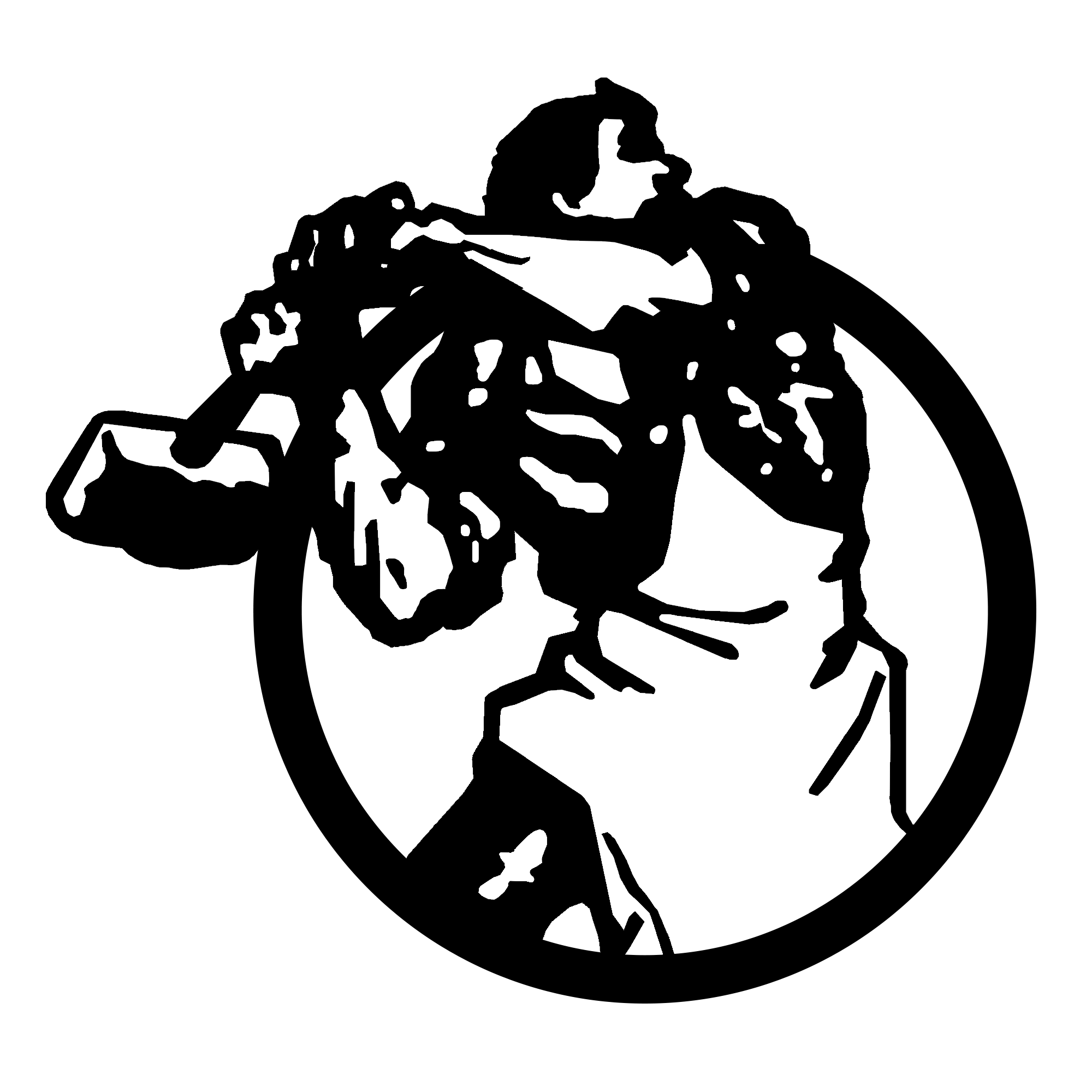 Le logo de la troisième internationale communiste représente un forgeron muni d'un marteau.